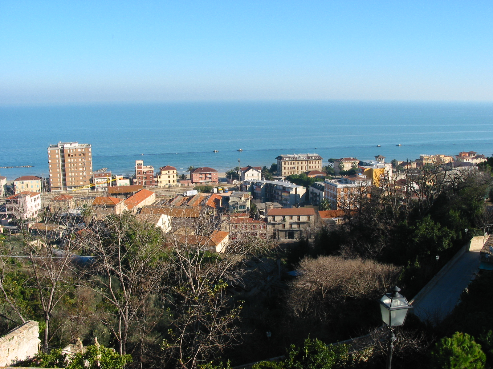 Grottamare, Marche, Italia